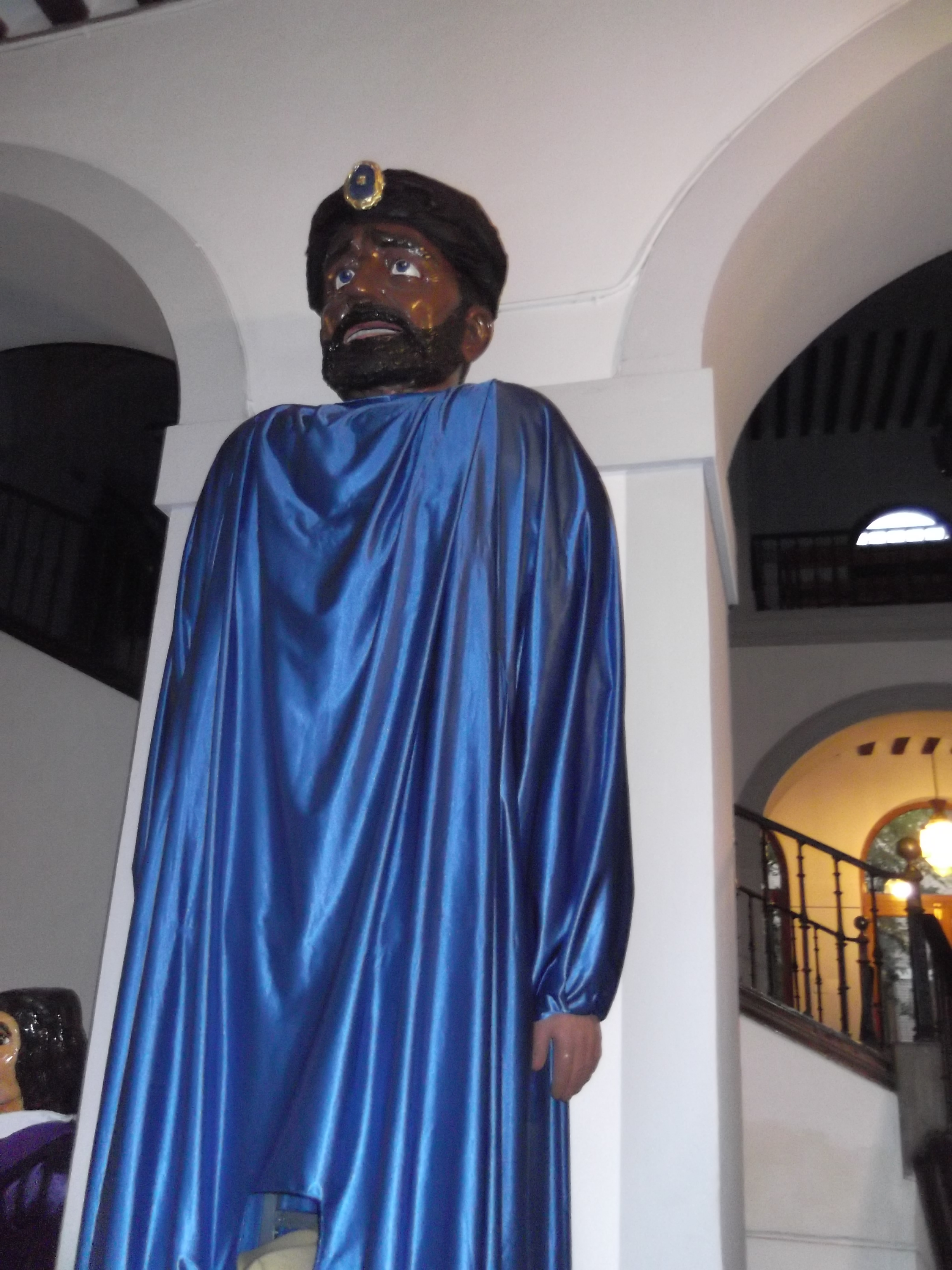 Gigantes de Alcalá de Henares